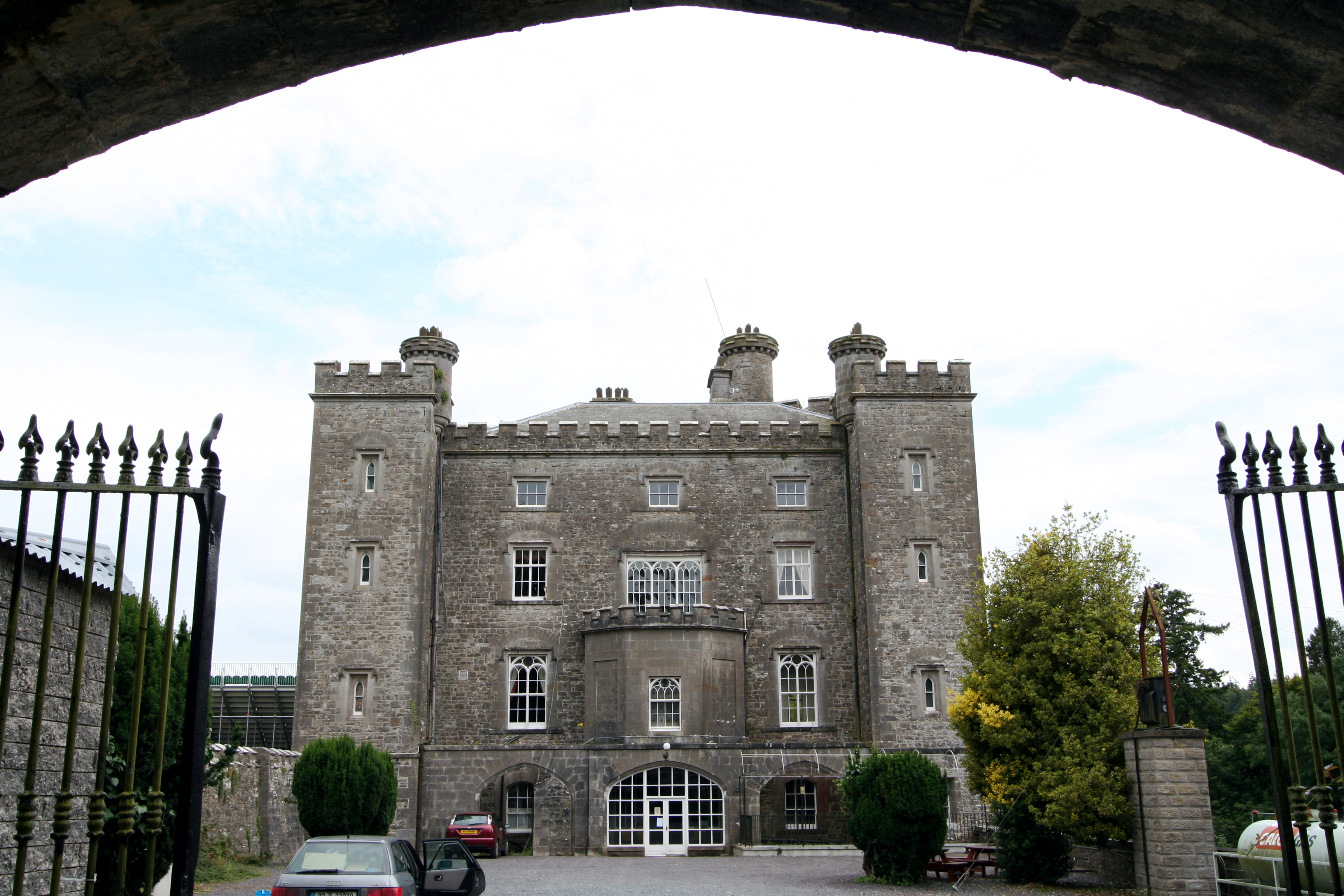 Castillo de Slane